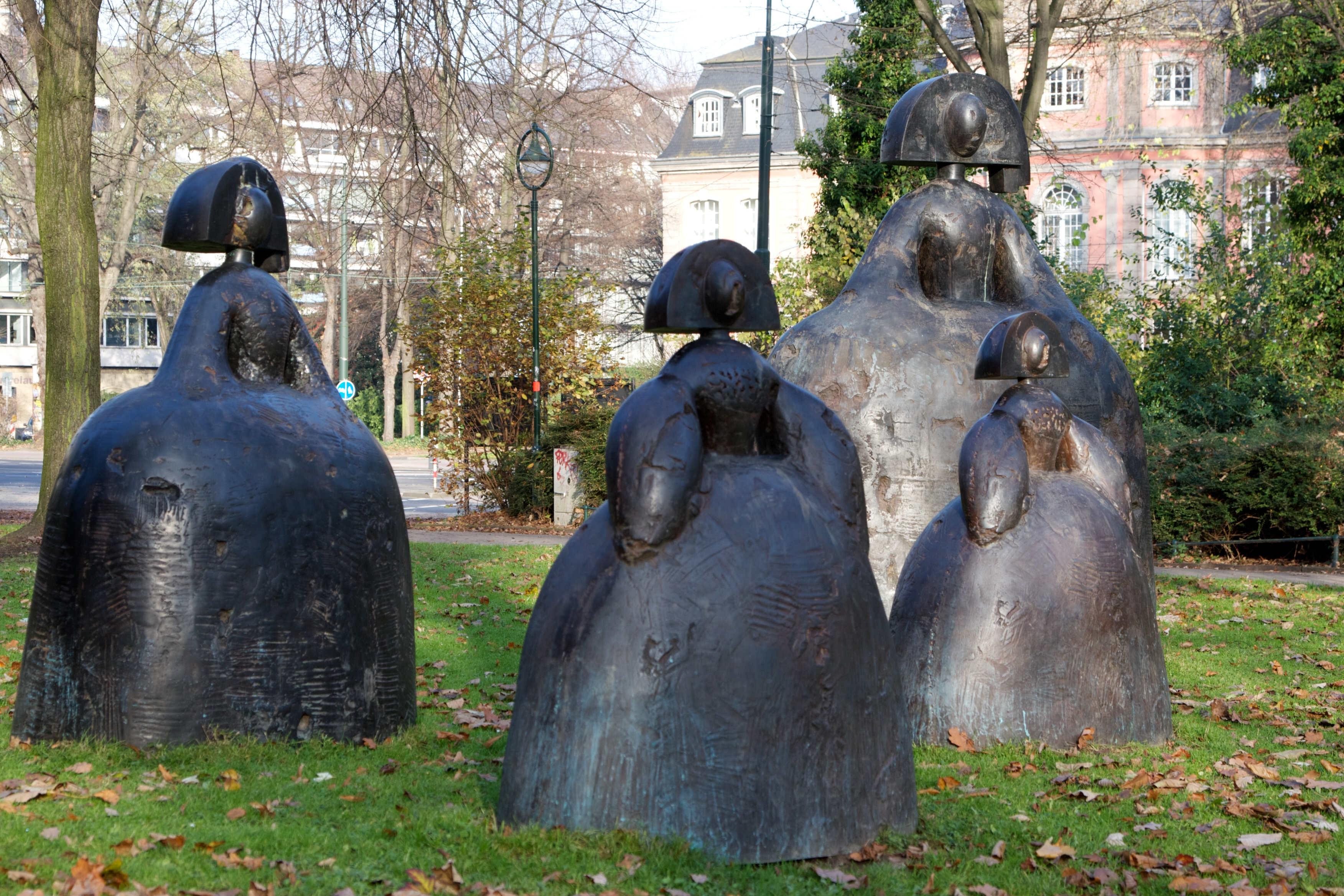 Manolo Valdés, Las Meninas, Bronze 2006, Düsseldorf, Hofgarten